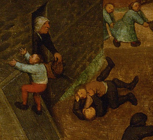 Eine alte Frau schüttet einen Eimer Wasser über zwei Raufbolde. Detail aus Die Kinderspiele